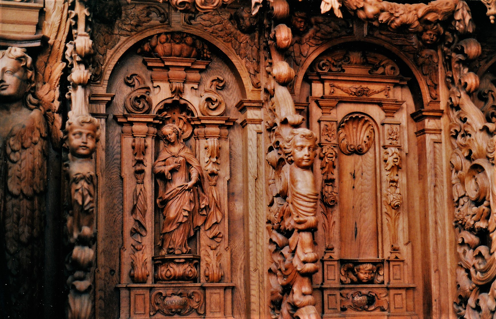 St. Maria (Buxheim): Chorgestühl von 1691, Nördliche Westseite